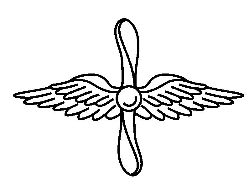 Знаки-эмблемы на петлицы родов войск и служб. Введены приказом НКО СССР № 33 от 10 марта 1936 года. С исправлениями, введенными приказами № 165 от 31 августа 1936 года, № 93 от 30 марта, № 121 от 12 апреля 1942 года, № 25 от 15 января и № 310 от 12 ноября 1943 года. 1. Автобронетанковые войска. 2. Военно-технический состав всех родов войск. 3. Военно-Воздушные Силы. 4. Железнодорожные войска. 5. Артиллерия и артиллерийские подразделения в других родах войск. 6. Автомобильные части и шофера всех родов войск. 7. Войска связи и связисты всех родов войск. 8. Инженерные войска. 9. Военно- медицинский состав всех родов войск. 10. Военно-ветеринарный состав всех родов войск (эмблема, в отличие от желтой медицинской, белого цвета). 11. Химические войска и химические подразделения всех родов войск. 12. Саперные части и саперные подразделения во всех родах войск. 13. Военные музыканты всех родов войск. 14. Военно-хозяйственный и административный состав всех родов войск. 15. Военно-юридический состав всех родов войск. 16. Понтонные части и подразделения инженерных войск. 17. Электротехнические части и подразделения инженерных войск. 18. Железнодорожные войска (приказ № 165). 19. Эмблема военнослужащих интендантской и административной служб (приказ № 93). 20. Военно-технический состав. 21. Кавалерия (в приказе № 25 от 15 января 1943 года количество эмблем было сокращено до 16; №№ 11, 14, 15, 16, 17 вышли из употребления). 22. Военно-топографическая служба (приказ № 25). 23. Дорожные войска (приказ № 310)